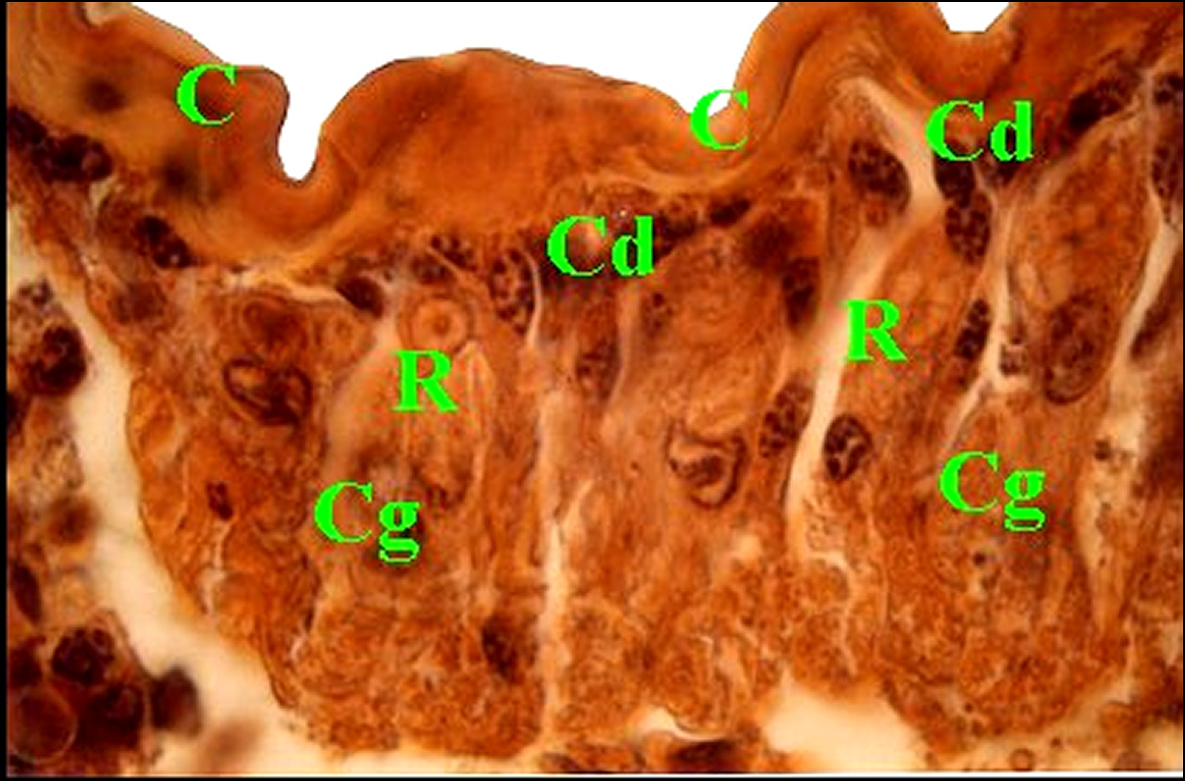 Détails de la glande antéro-dorsale d'un pédicule de Meta, coupe histologique